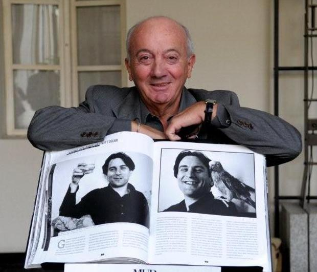 Il fotografo Giovanni Ferraguti durante la presentazione del suo libro "Scatti di Cronaca".